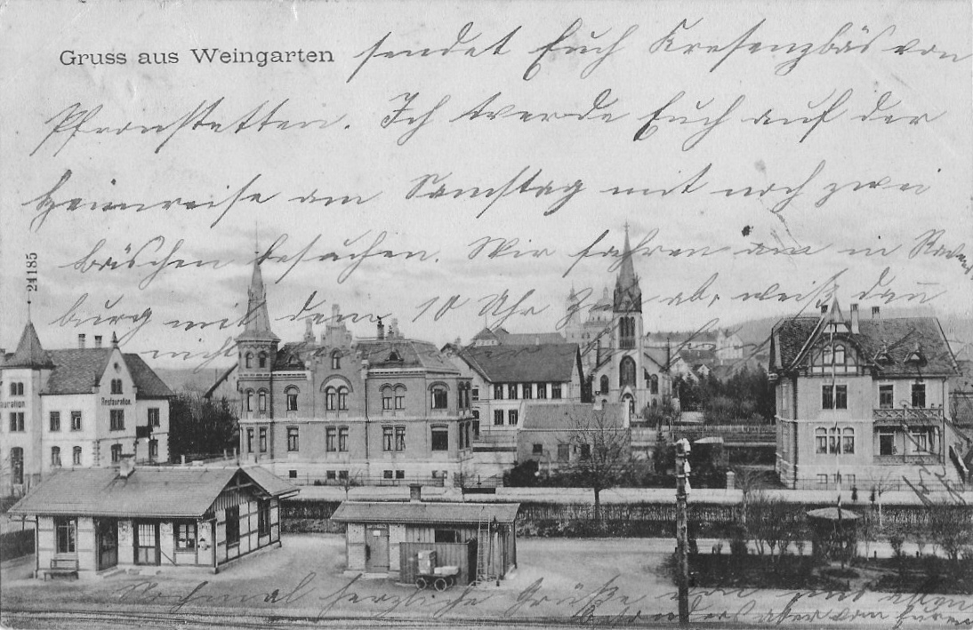 Weingarten (Württemberg). Charlottenplatz mit P Weingarten-Stadt, Ansichtskarte.